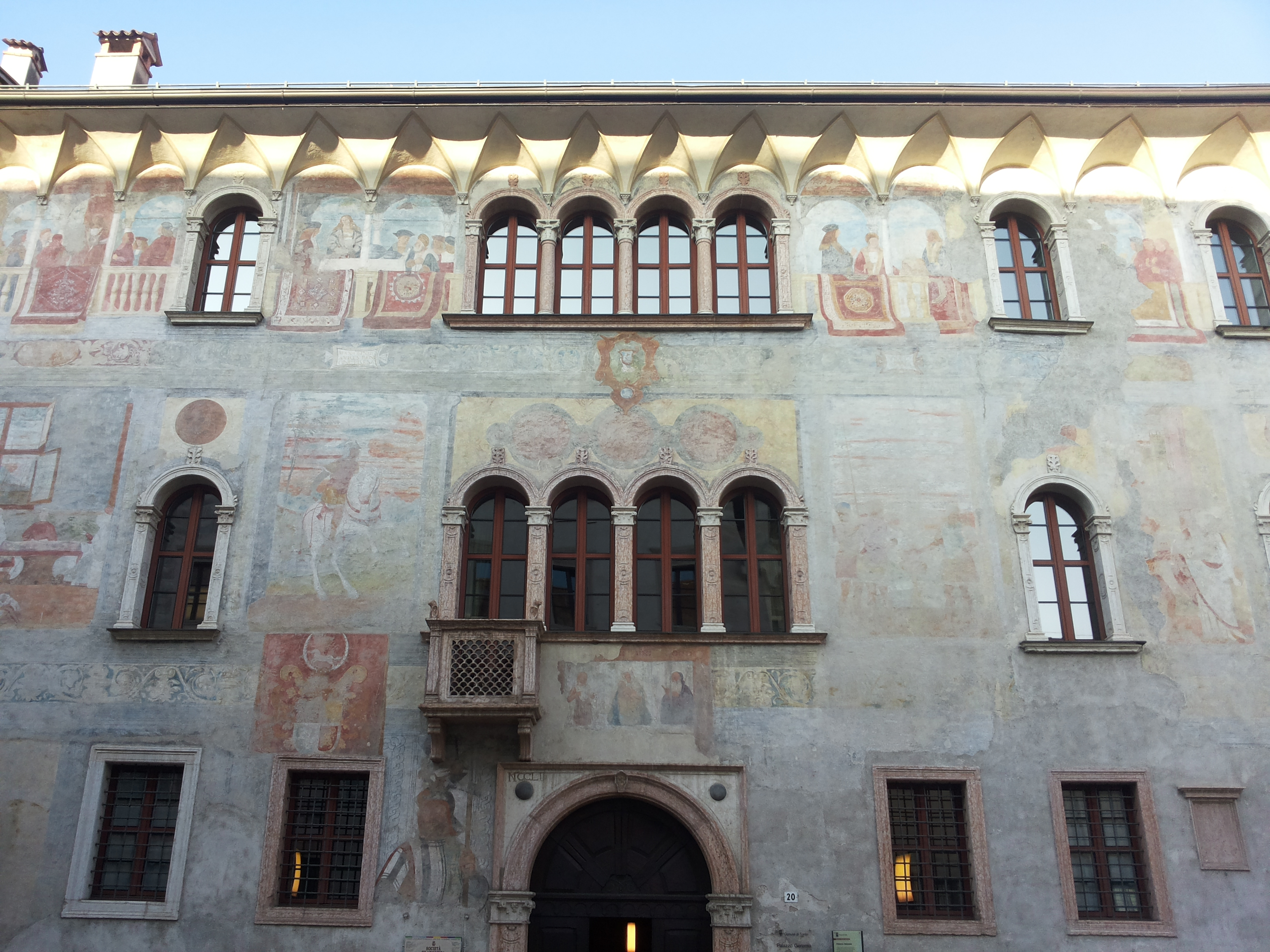 Palazzo Geremia a Trento